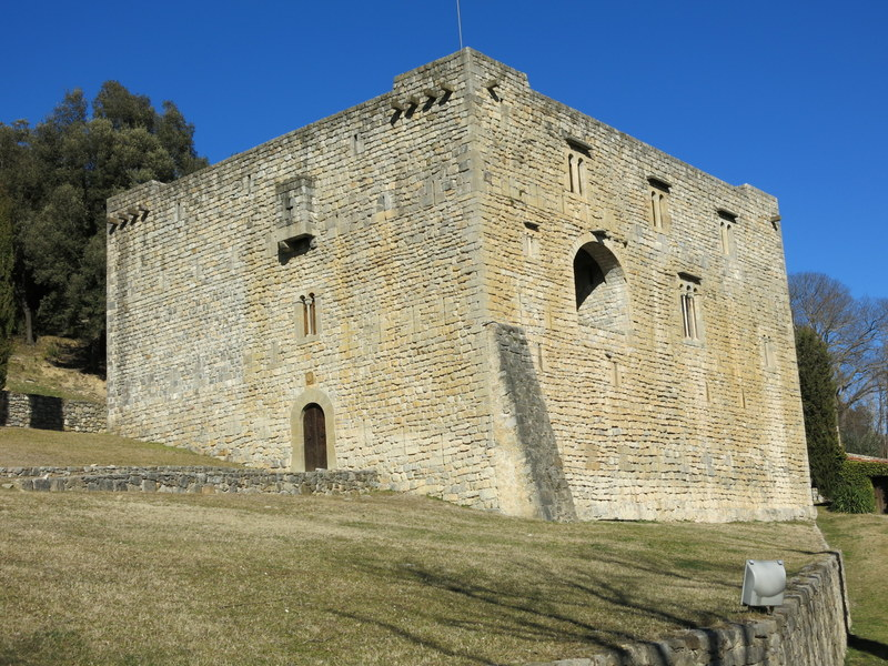 Castell d' Oix - Montagut i Oix / Garrotxa- Catalunya